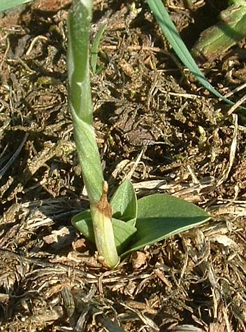 Spiranthe d'automne, Gézier-et-Fontenelay, 12 septembre 2004